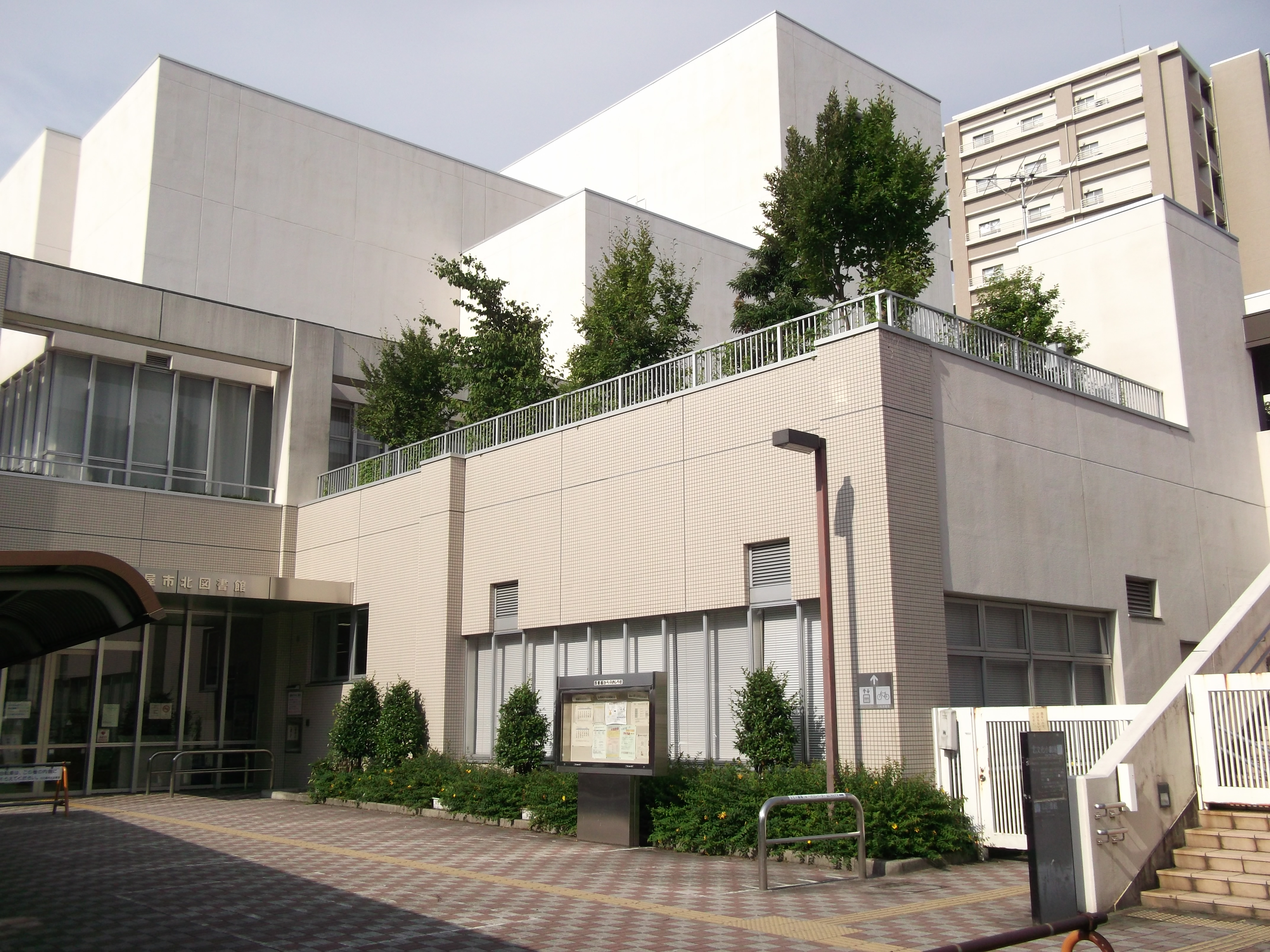 名古屋市北区志賀町にある名古屋市北図書館・北文化小劇場